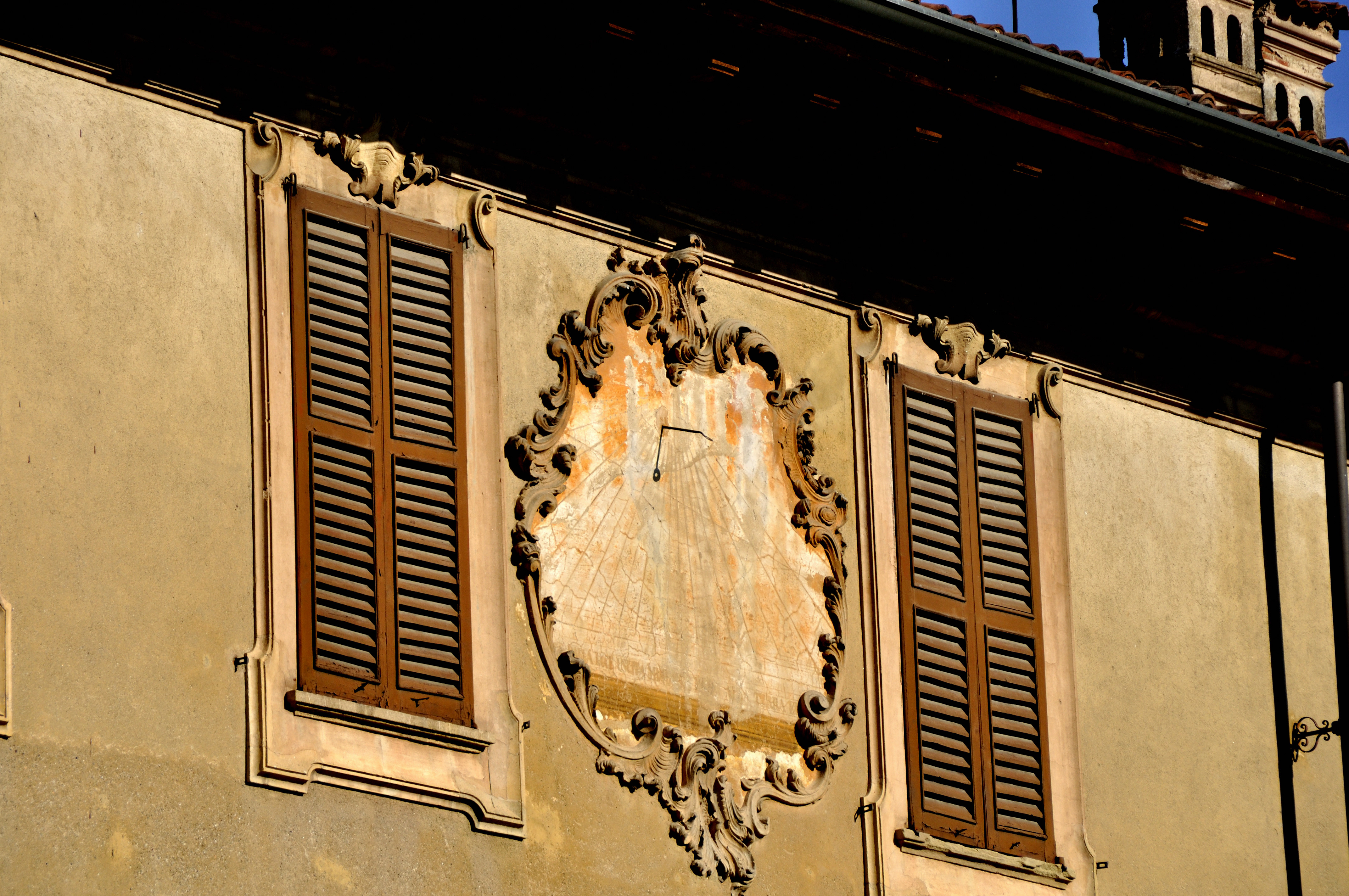 L'immagine vuole rappresentare il dettaglio della meridiana presente nella Villa Jacini di Tregasio.